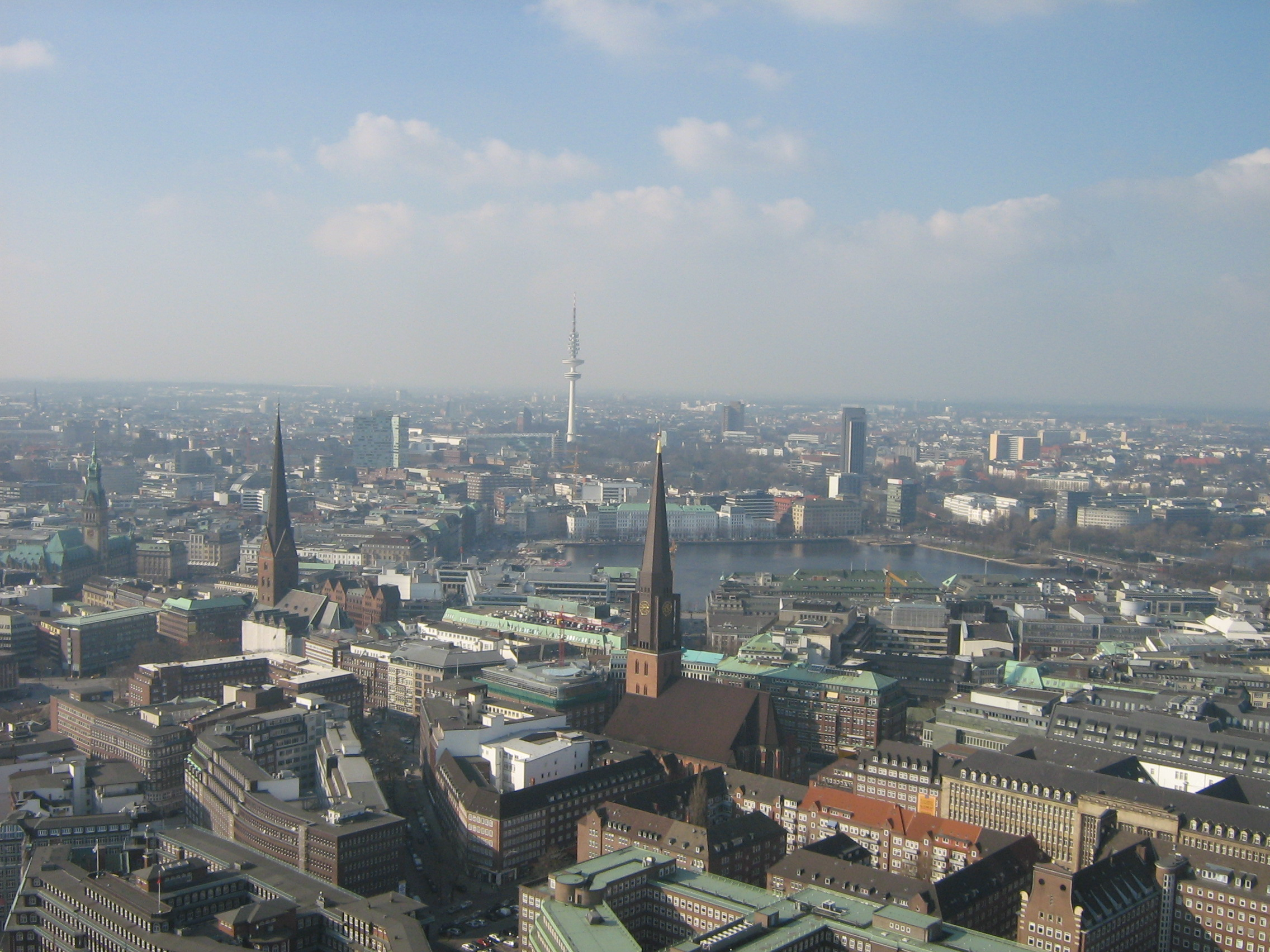 Die Hamburger Innenstadt, selbst fotografiert